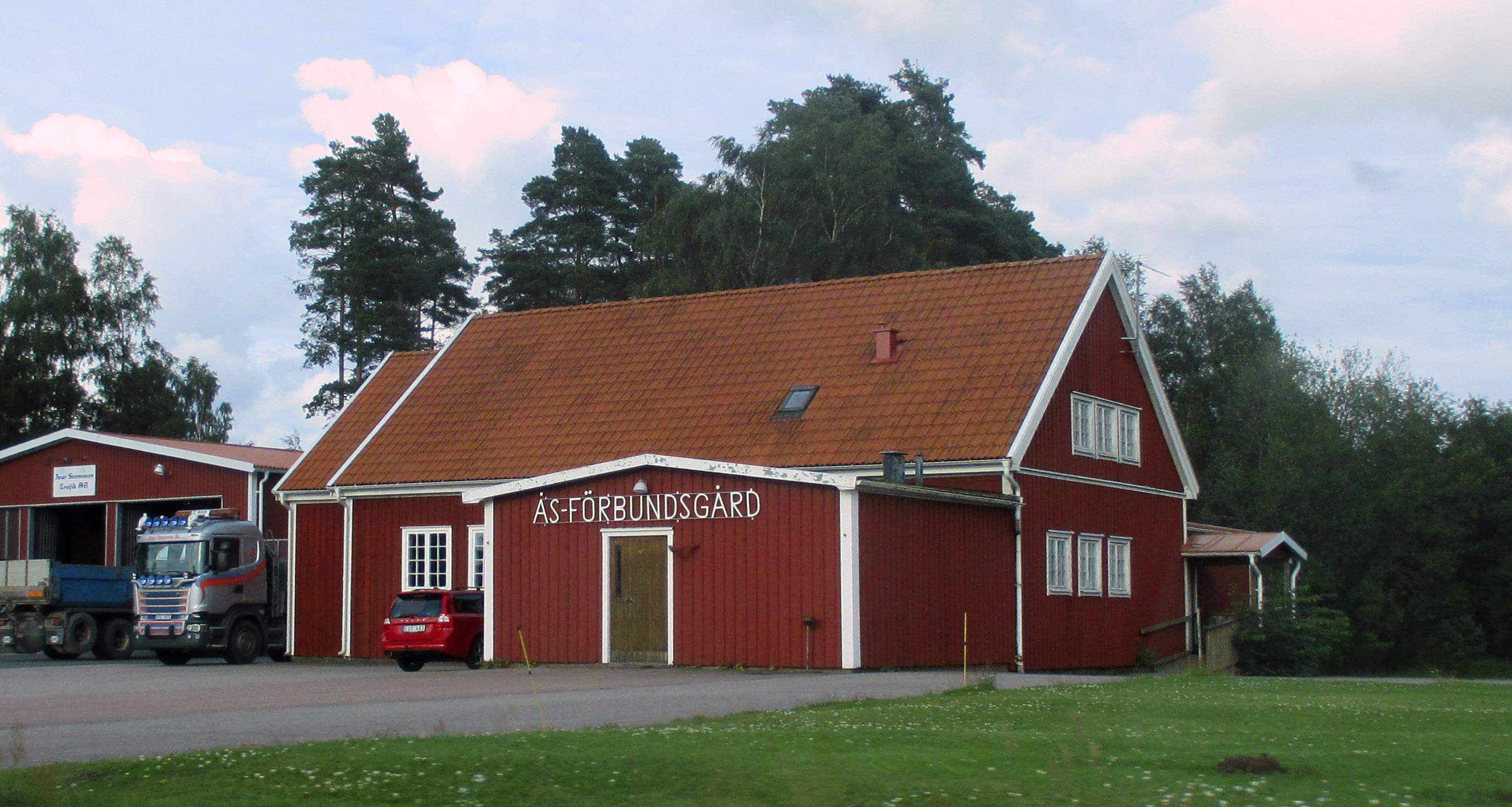 Ås förbundsgård i Ås socken, Gislaveds kommun, Finnveden, Småland, Sverige. Den sägs vara byggd 1919 och vara Sveriges äldsta bygdegård.